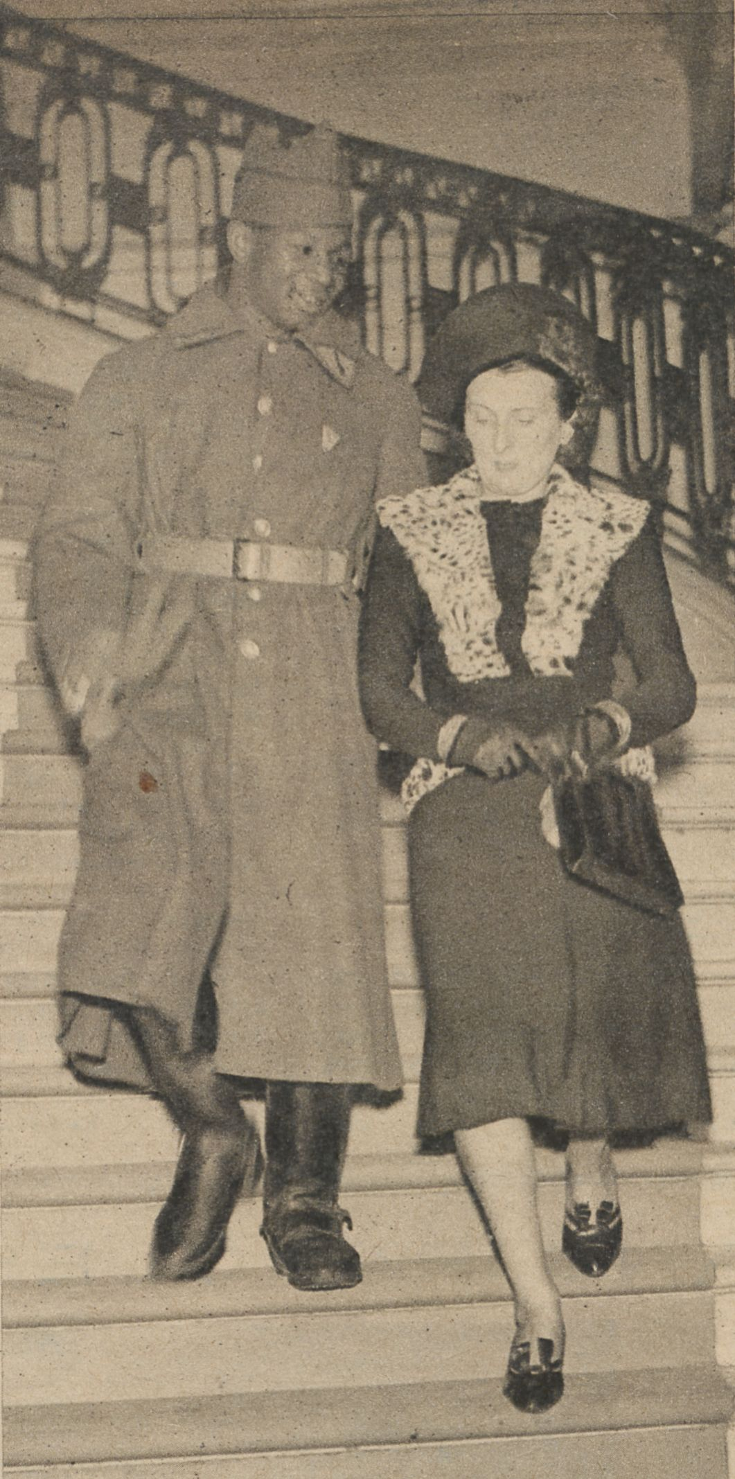 DIOUF, champion de France de boxe poids moyens, et artilleur, en compagnie de sa femme. Janvier 1940